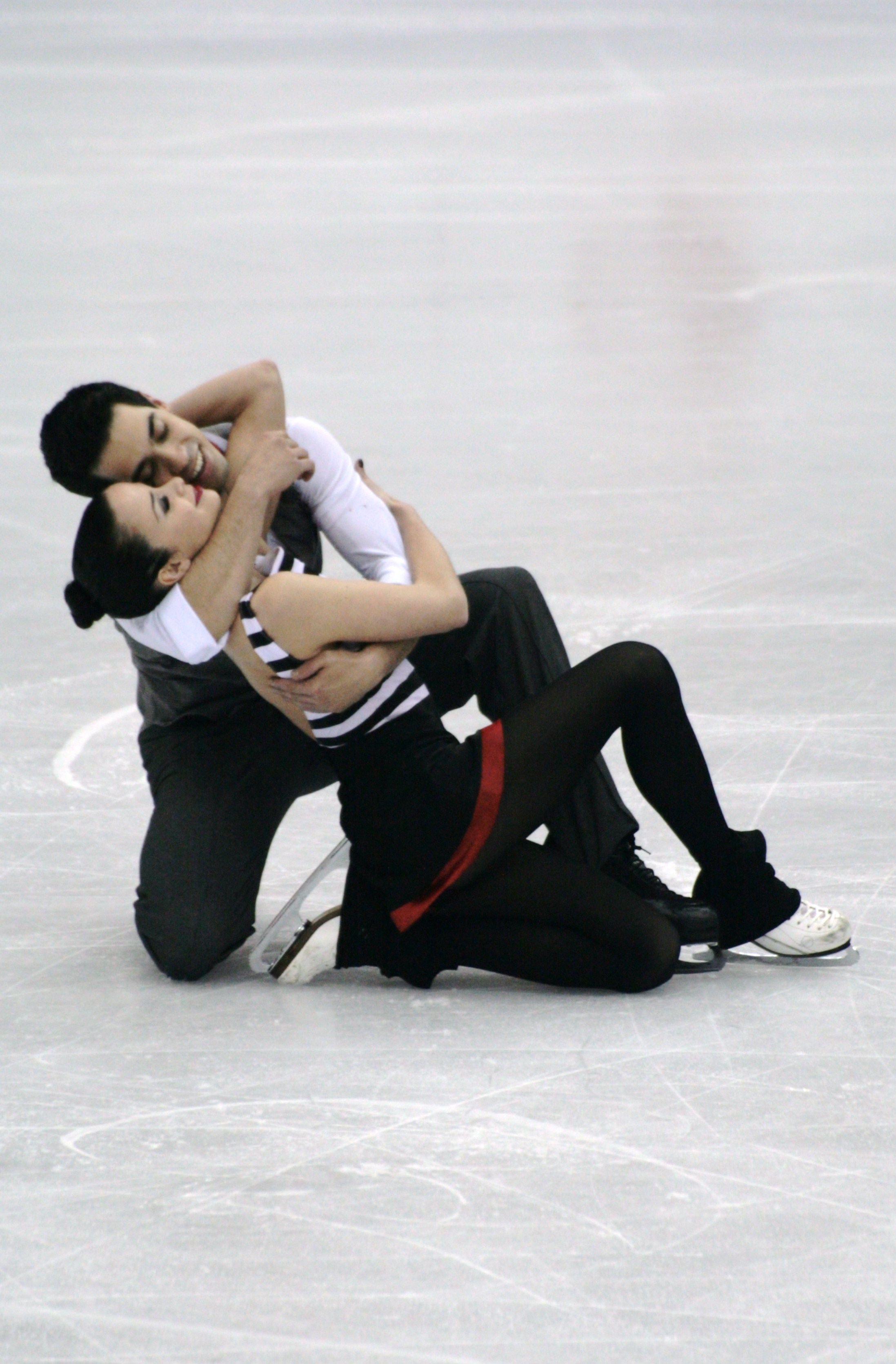 Анна Каппеллини и Лука Ланотте (Италия) на чемпионате мира по фигурному катанию 2012